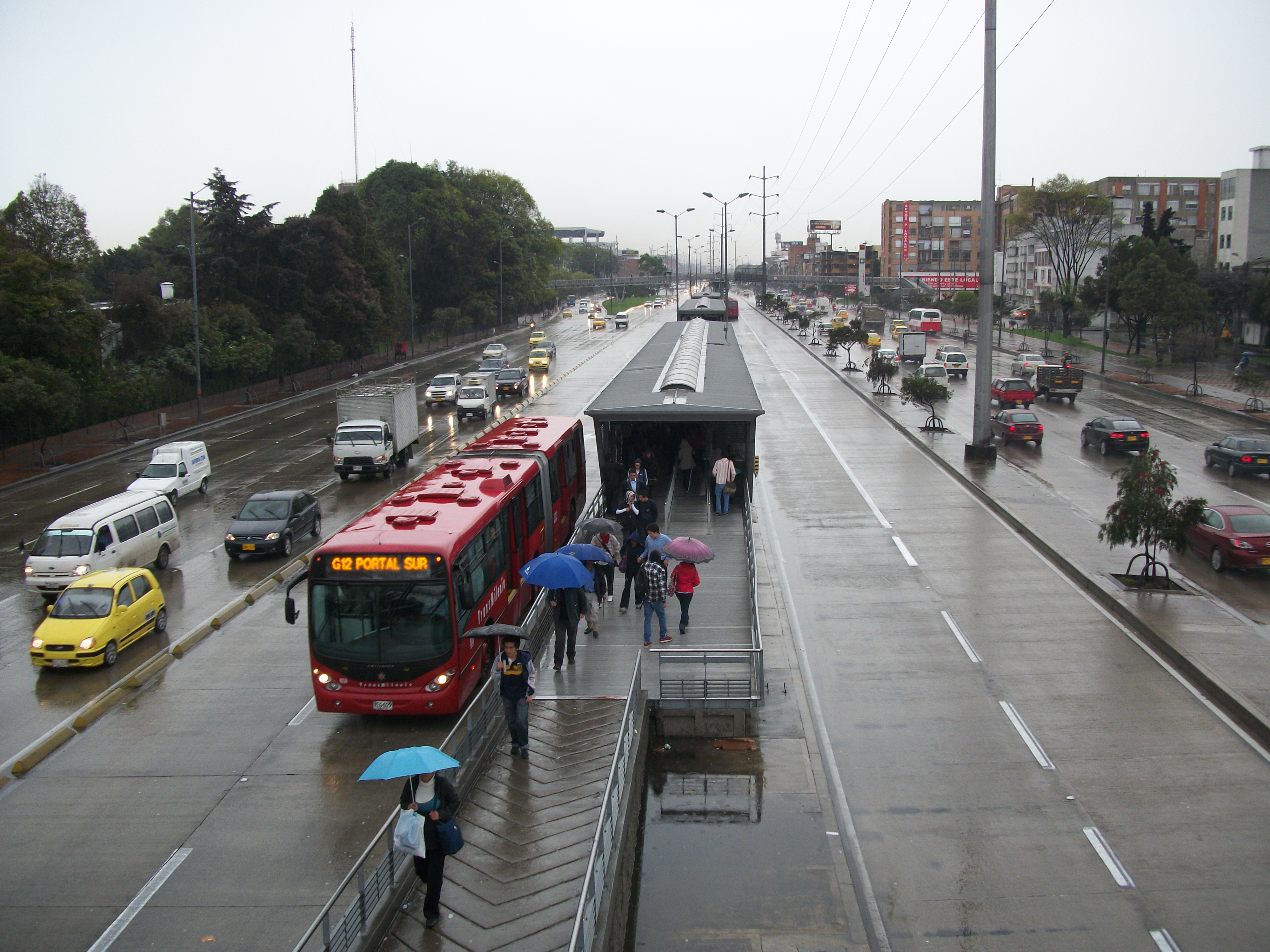 Estación de Transmilenio en la Universidad Nacional, sobre la cra 30.